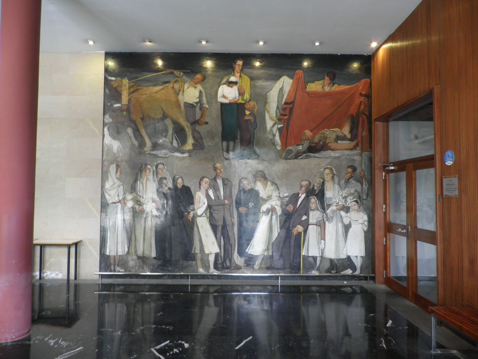 Pintura mural Homenatge a la vellesa (Miquel Farré) realitzada l'any 1957. Pg. de la Vall d'Hebron, 171 -Campus Mundet, Pavelló de Llevant- (Barcelona)